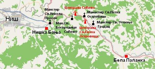 Materijalna dobra Sićevačke klisure, od istorijskog značaja (manstiri i hidrocentrale).